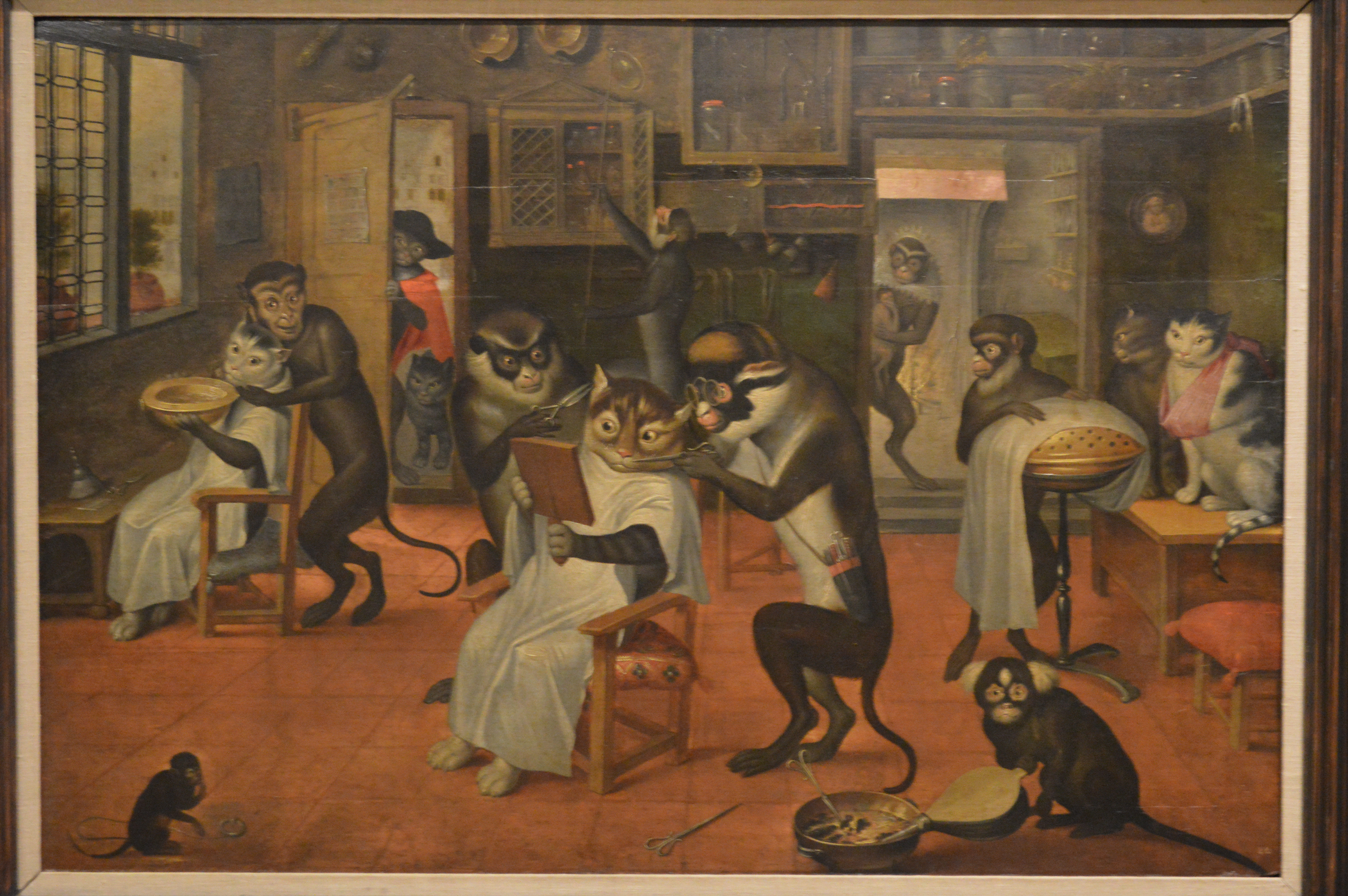 Pintura Barberia de monos y gatos de un seguidor de David Teniers el Joven. Siglo XVII. Óleo sobre tela. Bélgica. Museo Soumaya. Ciudad de México.